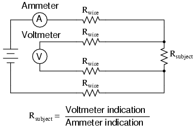 中文（中国大陆）: 四端点测量法解决远距离问题